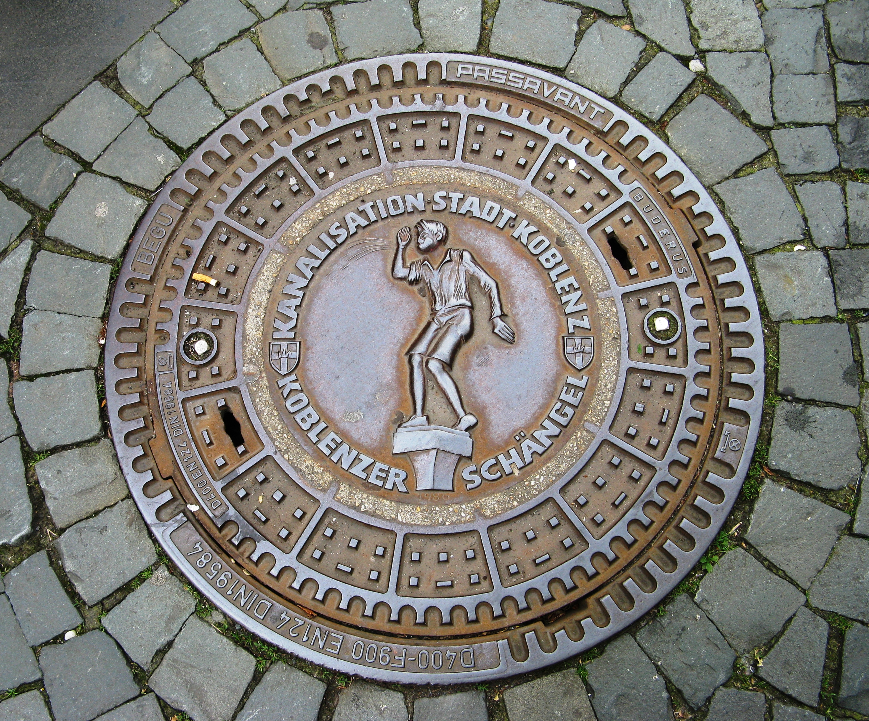 Der Koblenzer Schängel - Abbildung auf einem Kanaldeckel der Stadt Koblenz